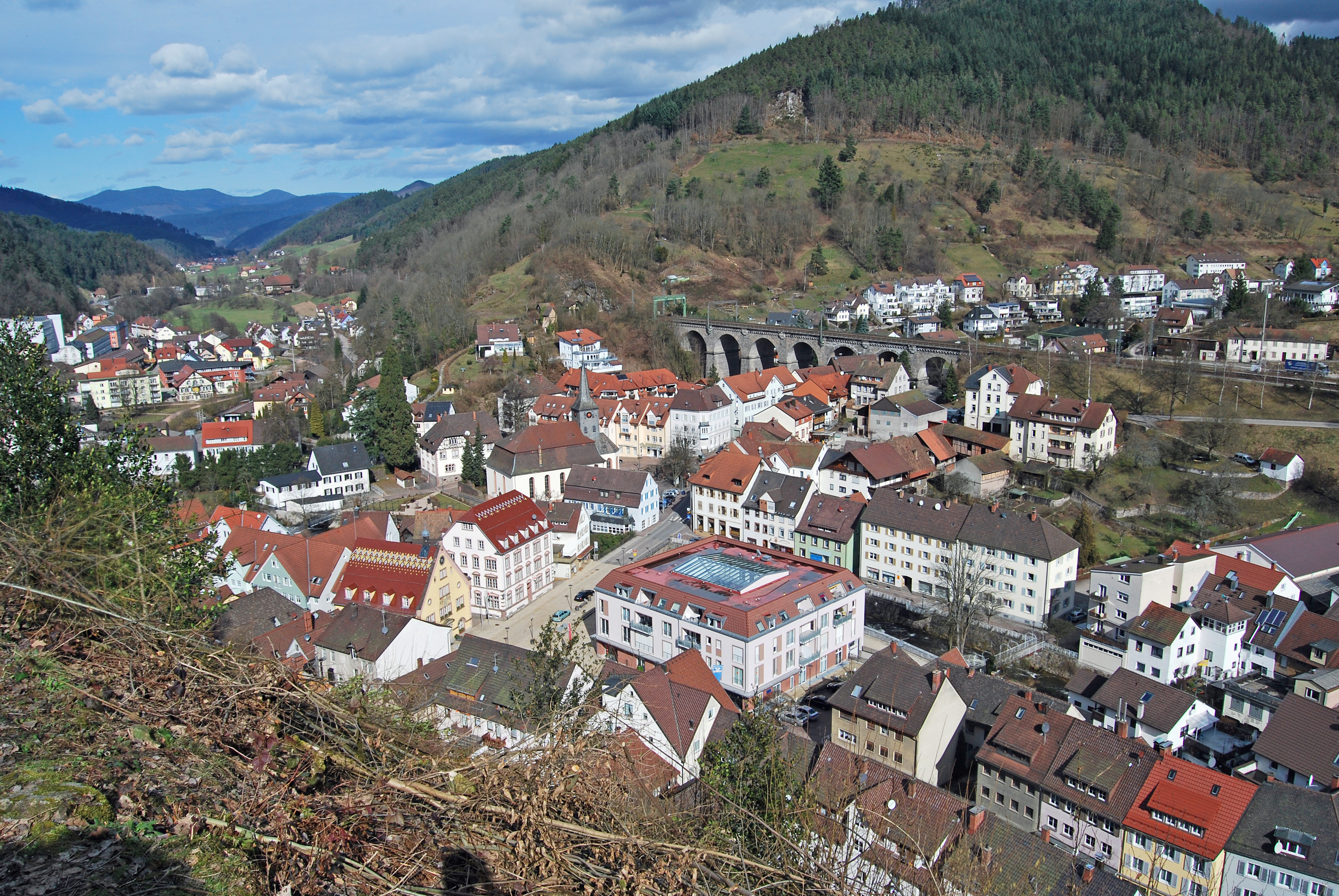 Hornberg